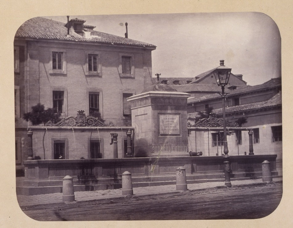 Madrid: Fuente de Leganitos en la desaparecida plaza de San Marcial. Obra en 1864 del fotógrafo toledano Alfonso Begué, muerto el 31 de octubre de 1865. Cartulina sepia. Albúmina. 43 x 32 cm. Fotografía contenida en un álbum procedente del Archivo de Villa y trasladado al Museo de Historia en 1983.